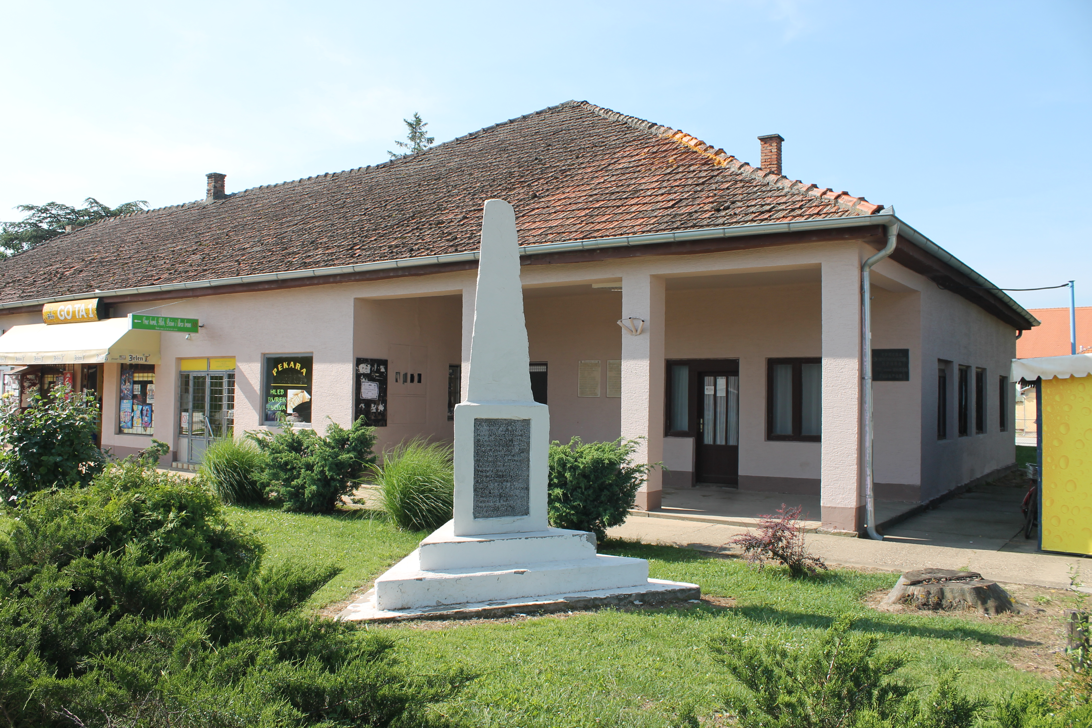 Gibarac